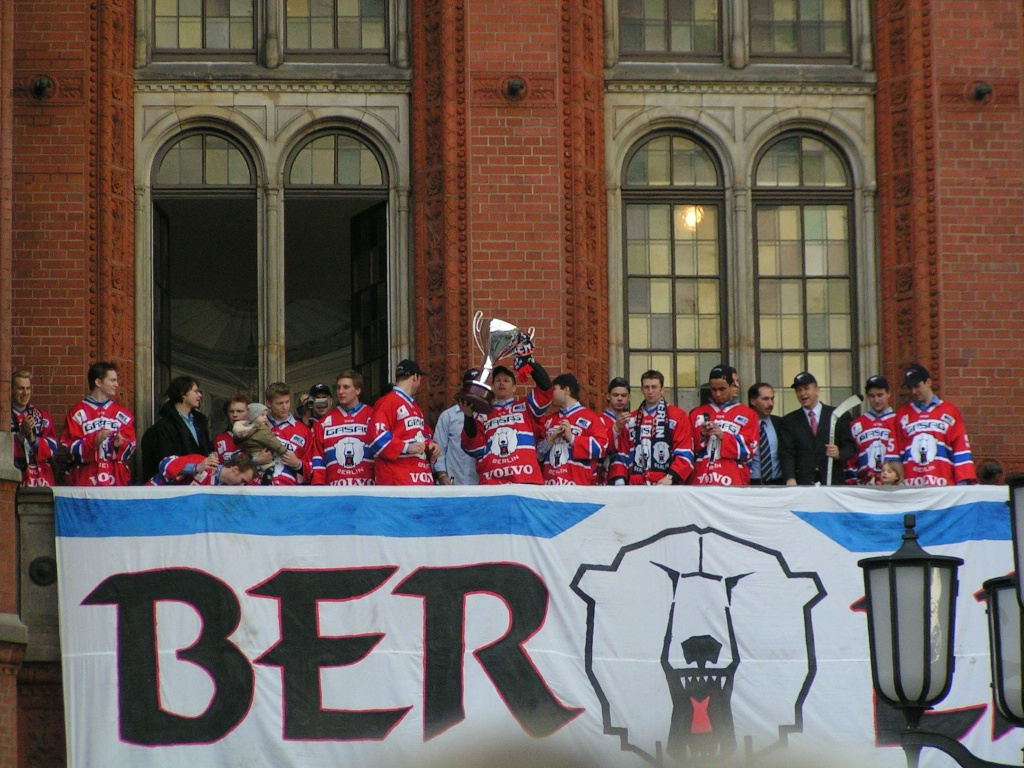 Beschreibung: Empfang des Deutschen Eishockeymeisters 2005 Eisbären Berlin im Roten Rathaus, 22. April 2005 Fotograf: David Herrmann Lizenz: GNU-FDL, CC de-2.0-by-sa